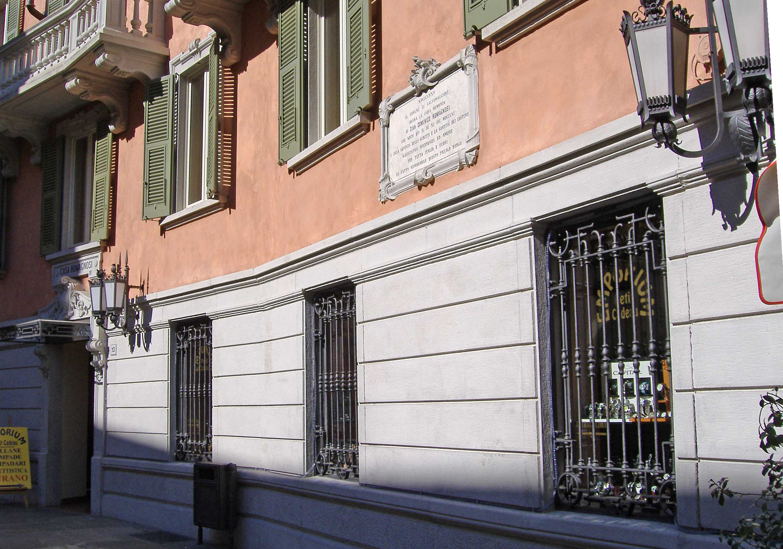 Casa natale di Gian Domenico Romagnosi a Salsomaggiore Terme.